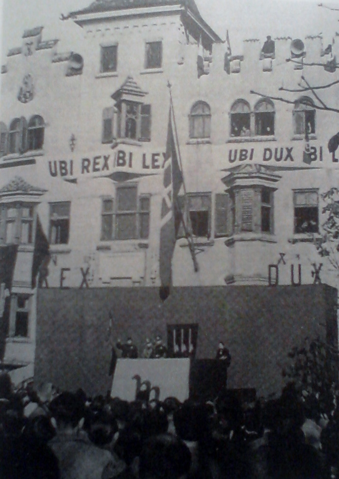 Ubi Rex, ibi Lex - ubi Dux, ibi Lux - Municipio di Bressanone